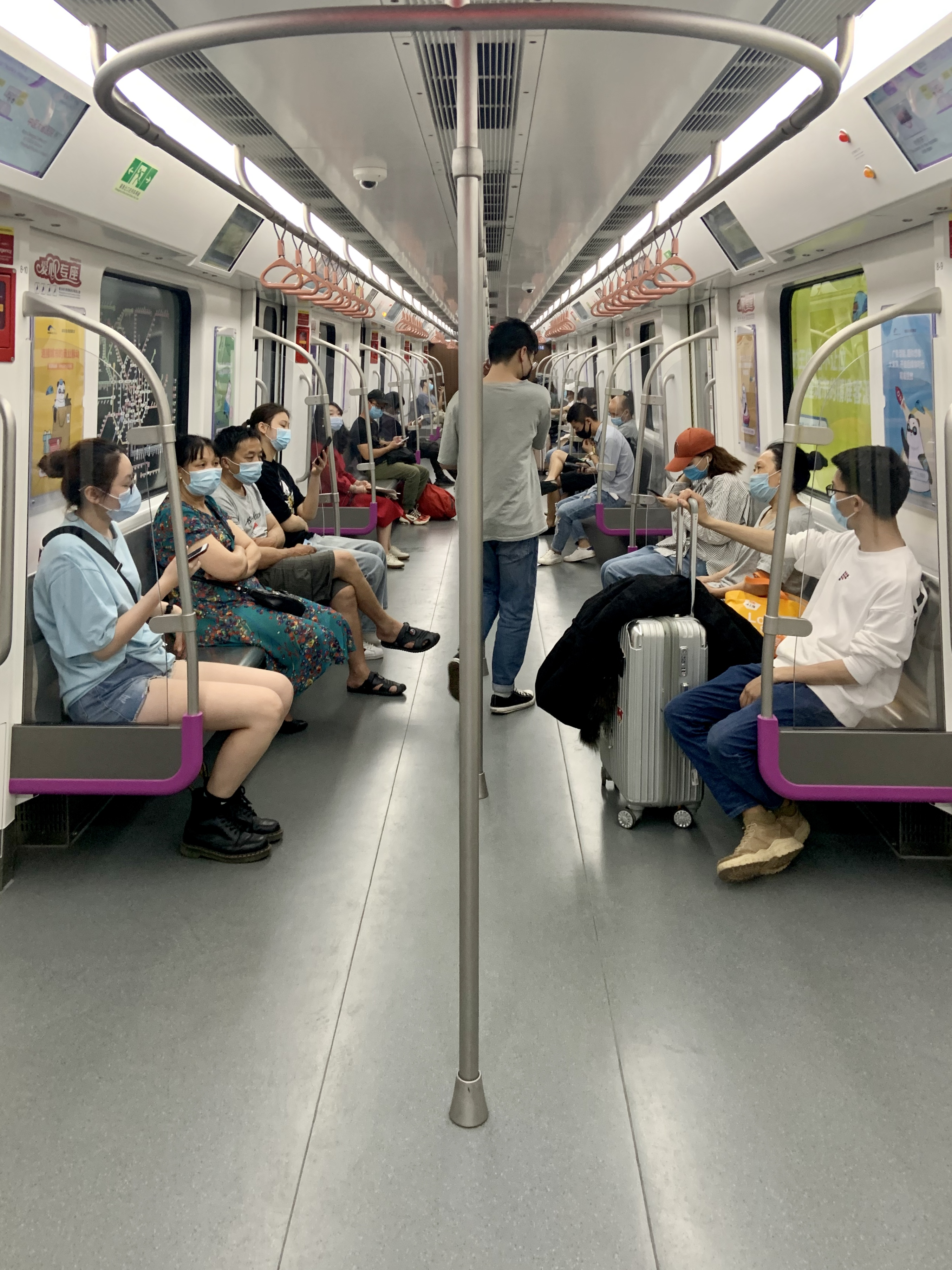 成都地铁5号线列车车厢内景